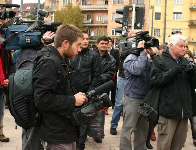 Médiaesemény